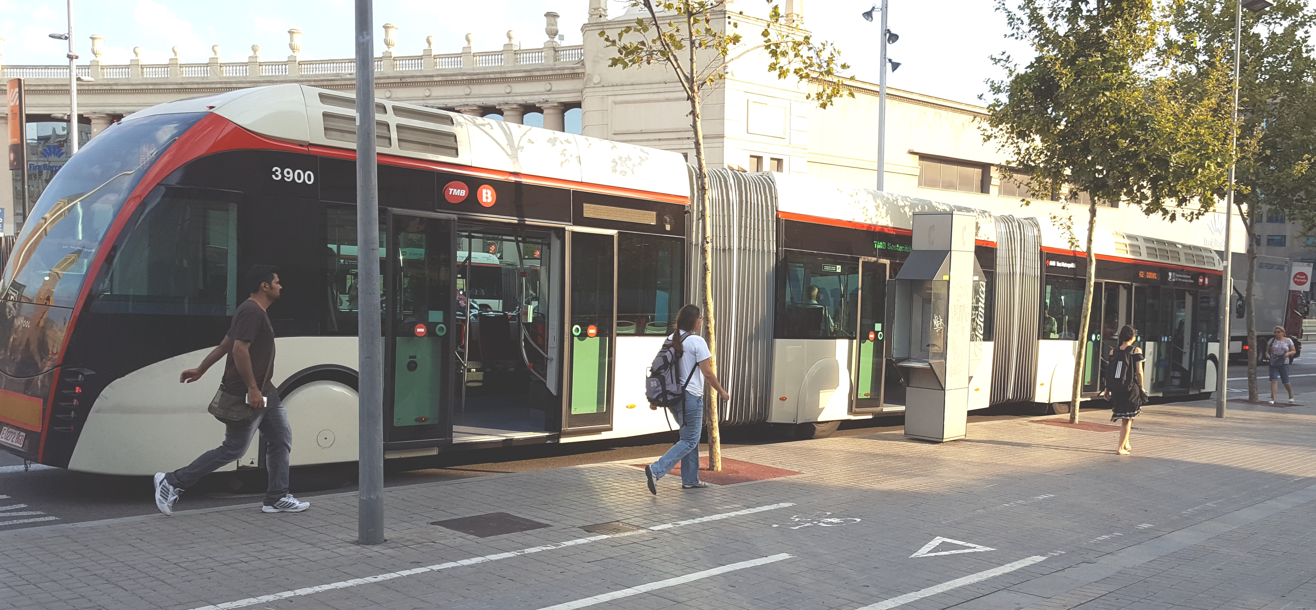 אוטובוס דו מפרקי בברצלונה